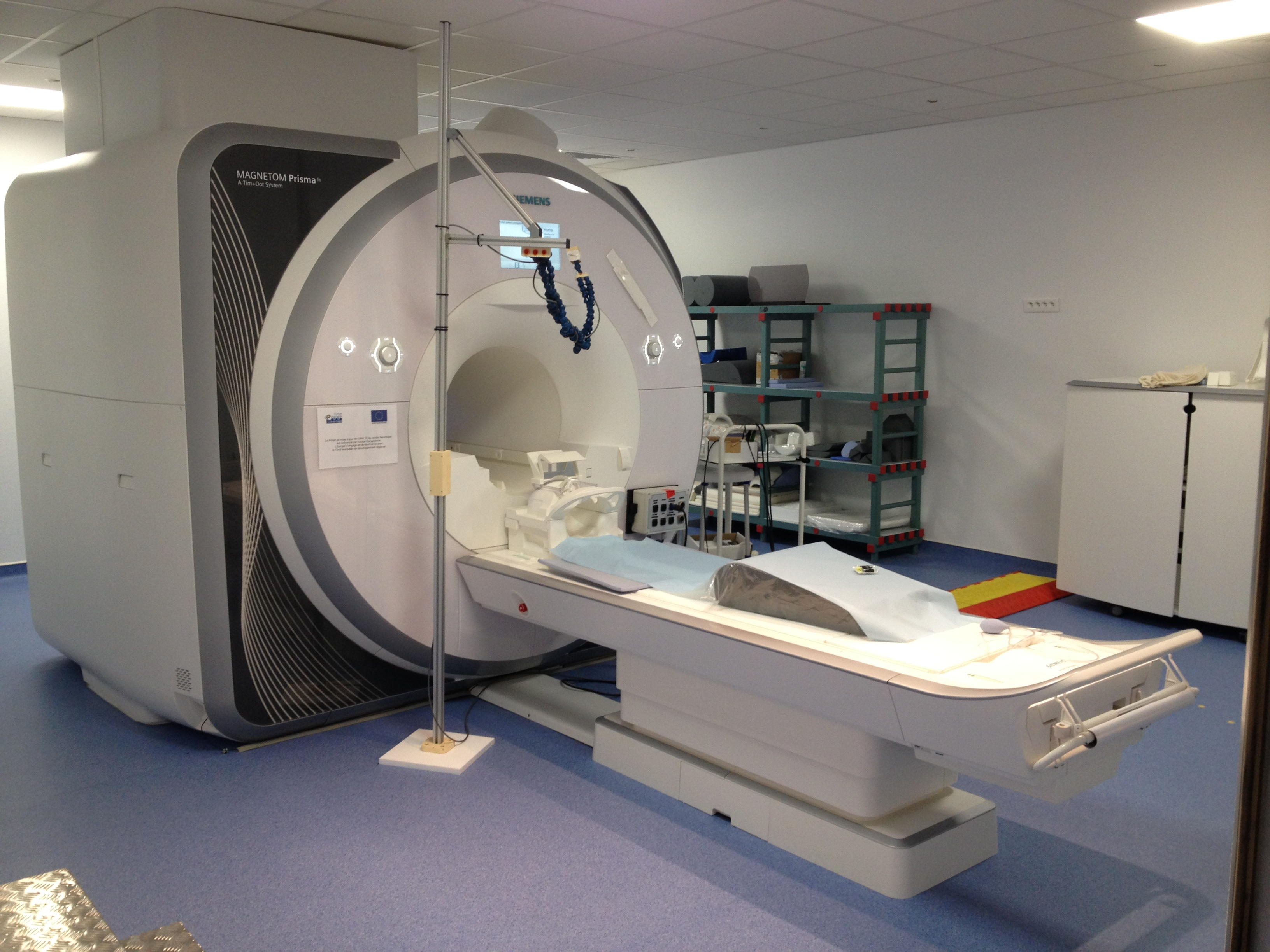 Photographie de l'IRM à 3 Tesla à NeuroSpin pour la recherche clinique.